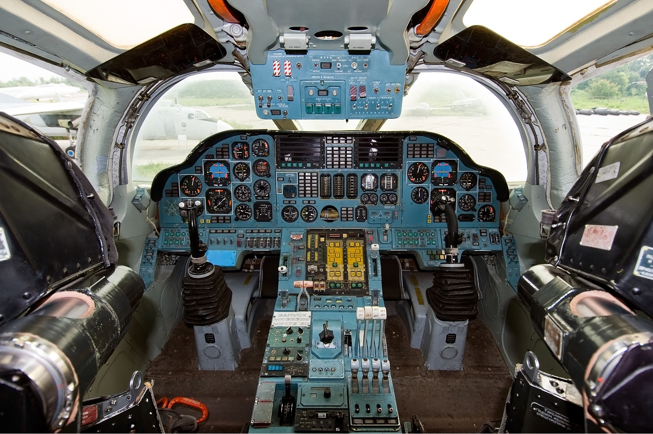 Tupolev Tu-160